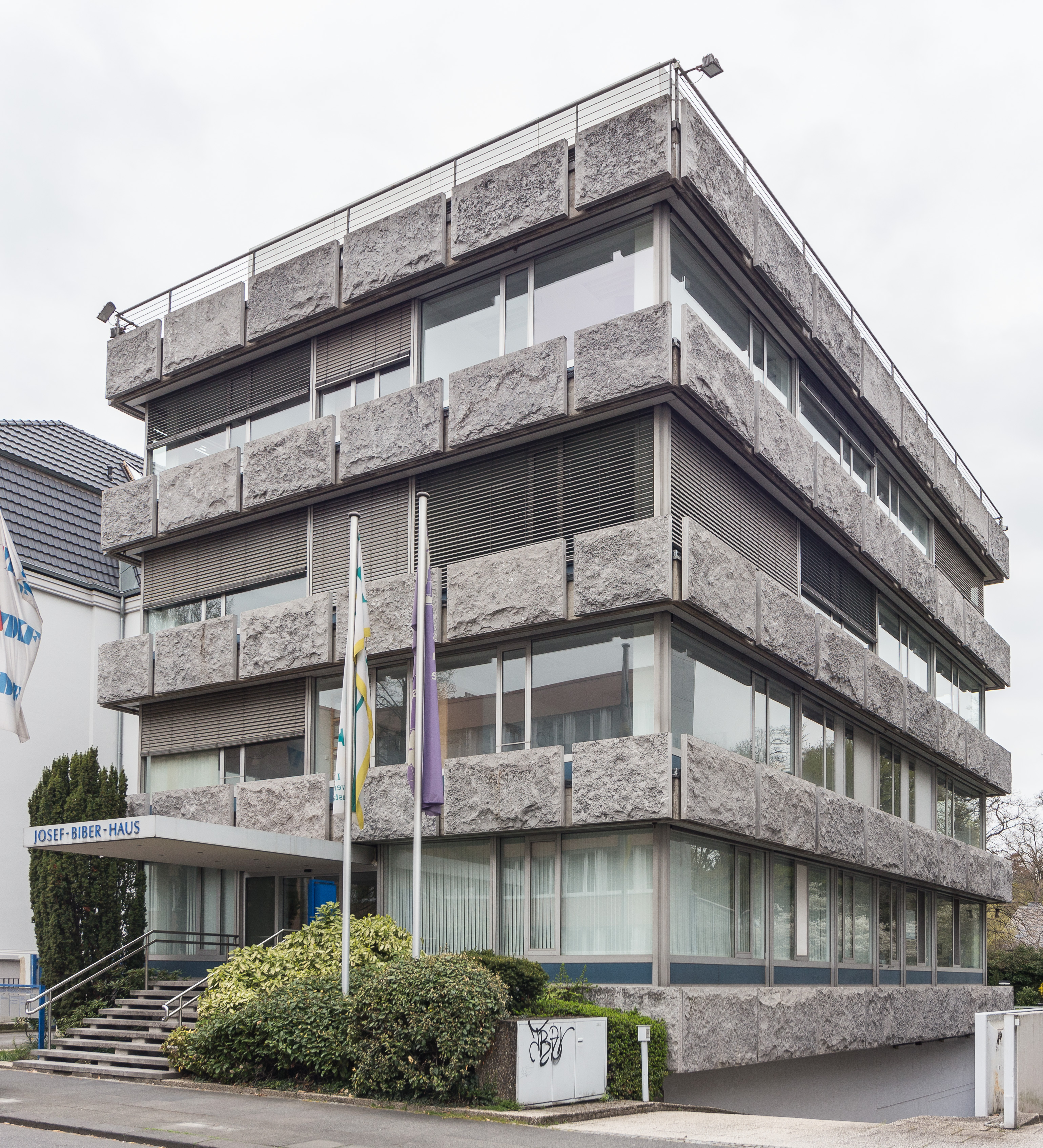 Josef-Biber-Haus (ehem. belgische Botschaft), Kaiser-Friedrich-Straße 7, Bonn